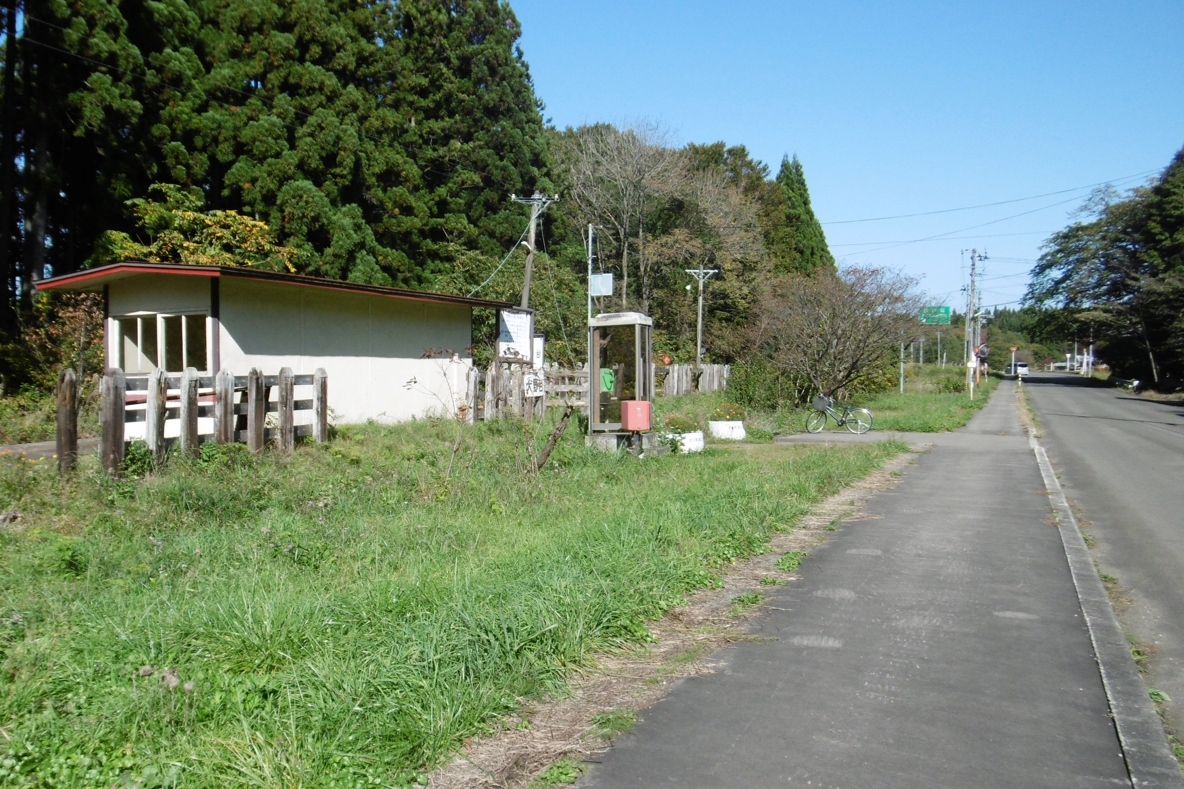 駅前の風景：秋田県北秋田市上杉字金沢